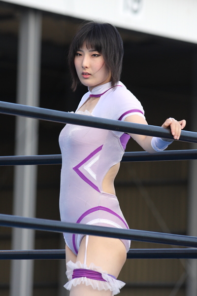 アイスリボン所属女子プロレスラー 真琴